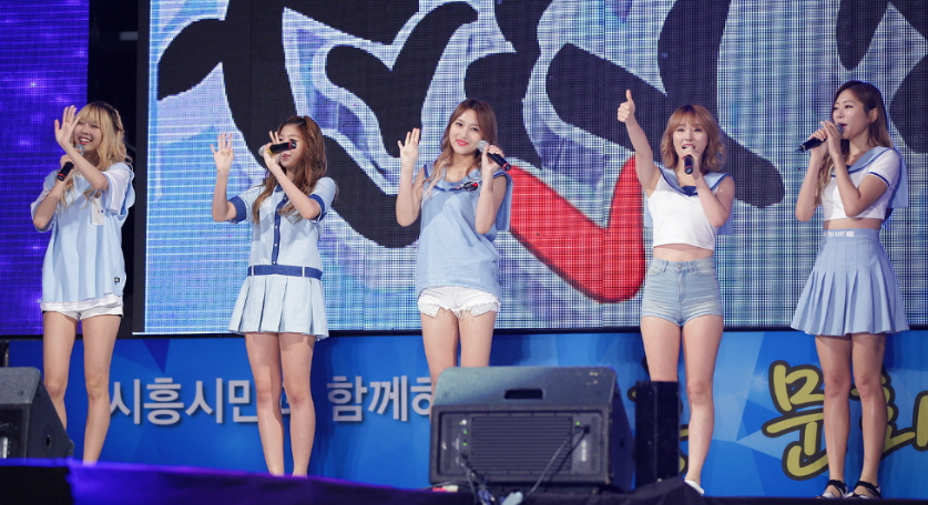 밍스(MINX) 착한콘서트 시흥 배곧신도시 생명공원